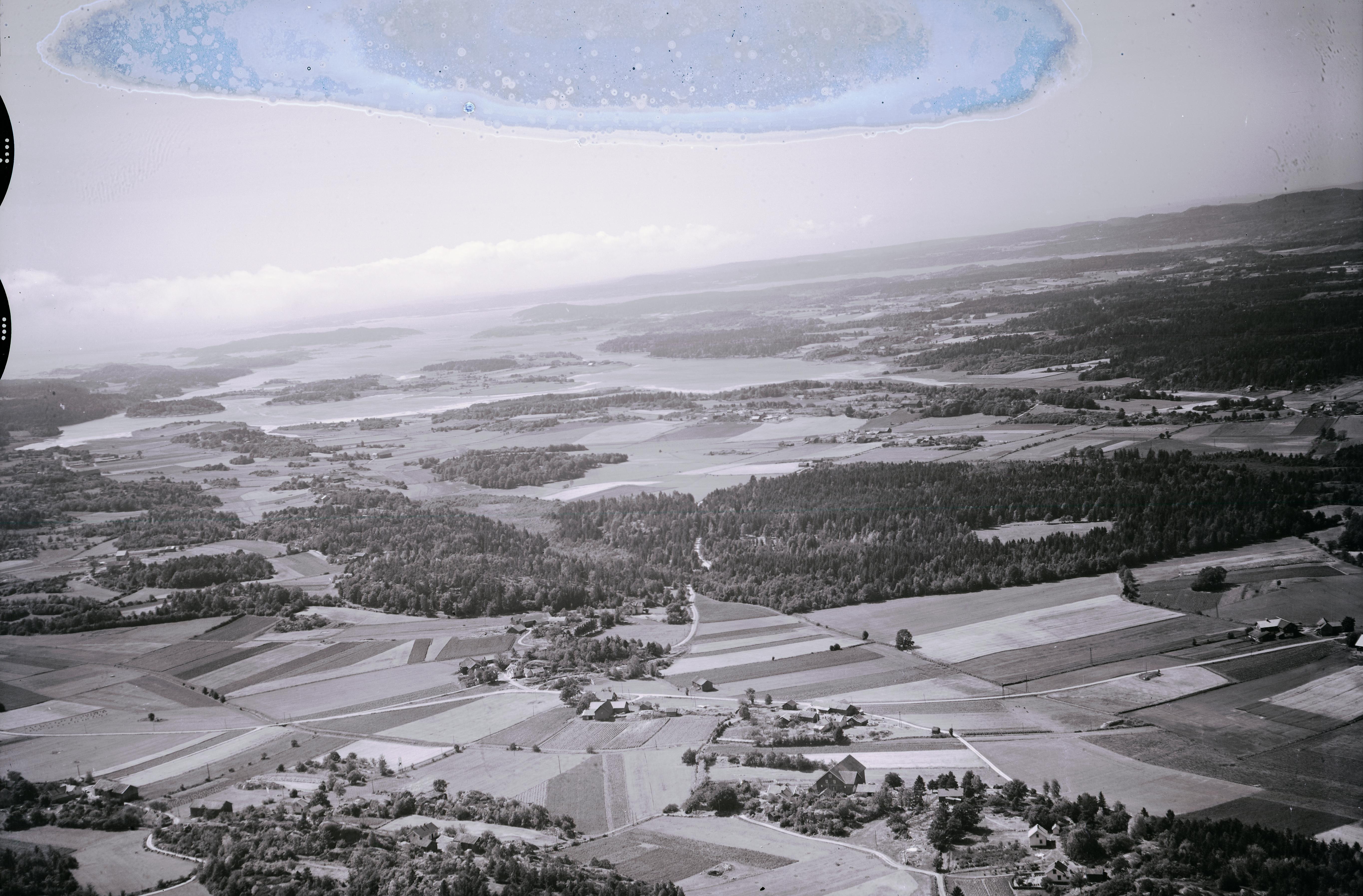 FW.HL.10796